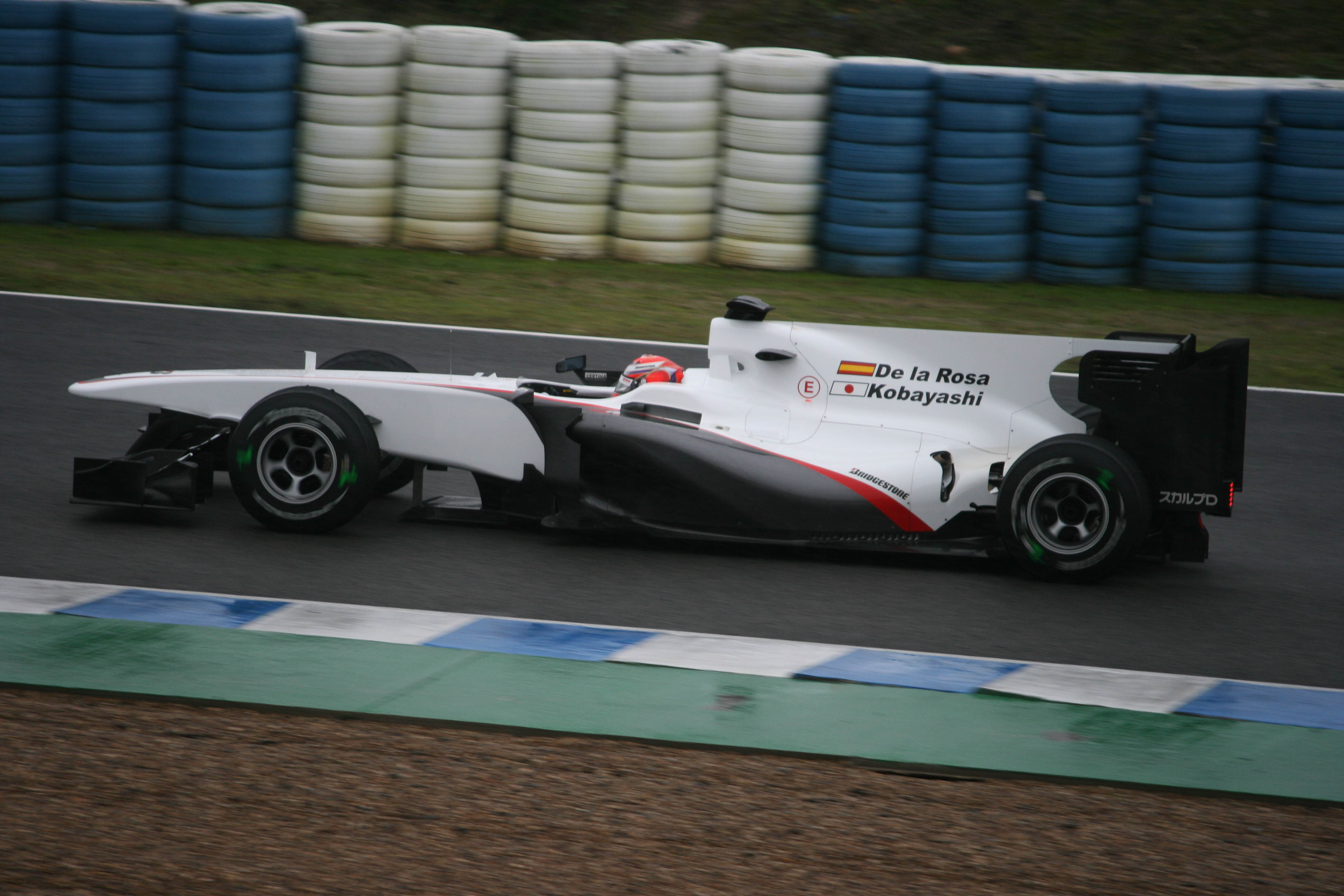 Kamui Kobayashi testing for Sauber at Jerez, 10/02/2010.